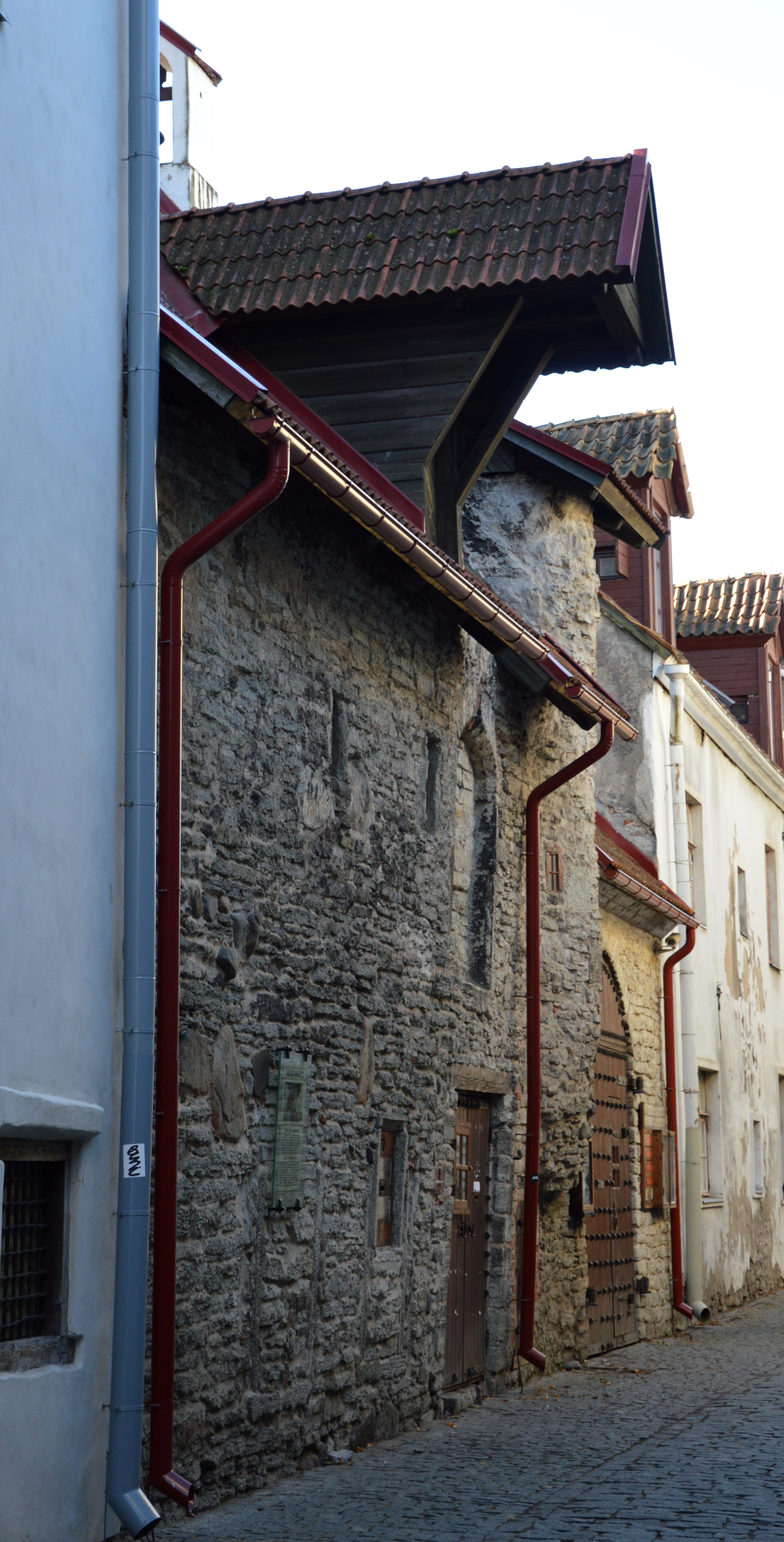 Ukrainisch griechisch katholische Kirche in Tallinn / Reval